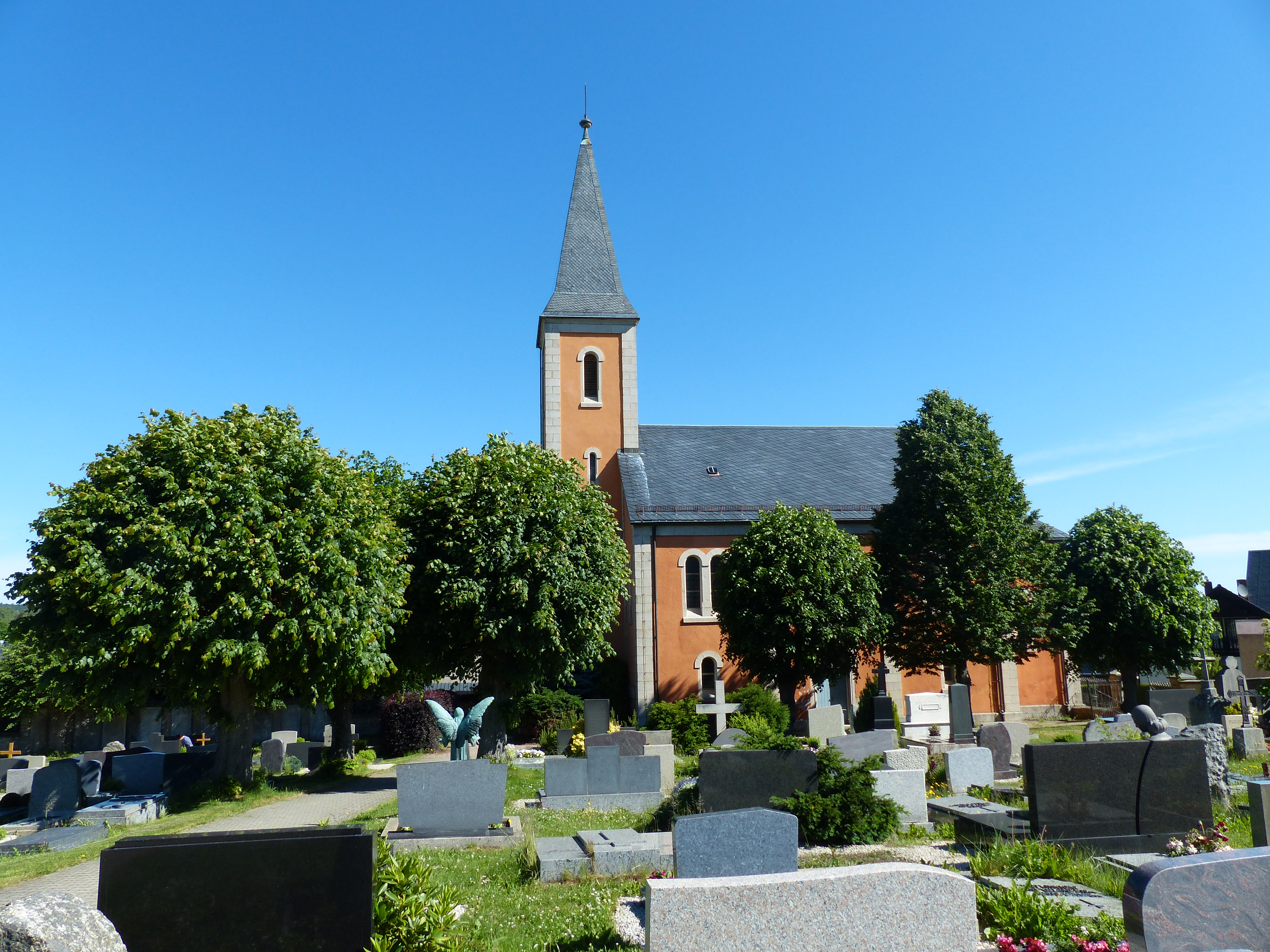 Bilderserie Baudenkmäler in Kirchenlamitz